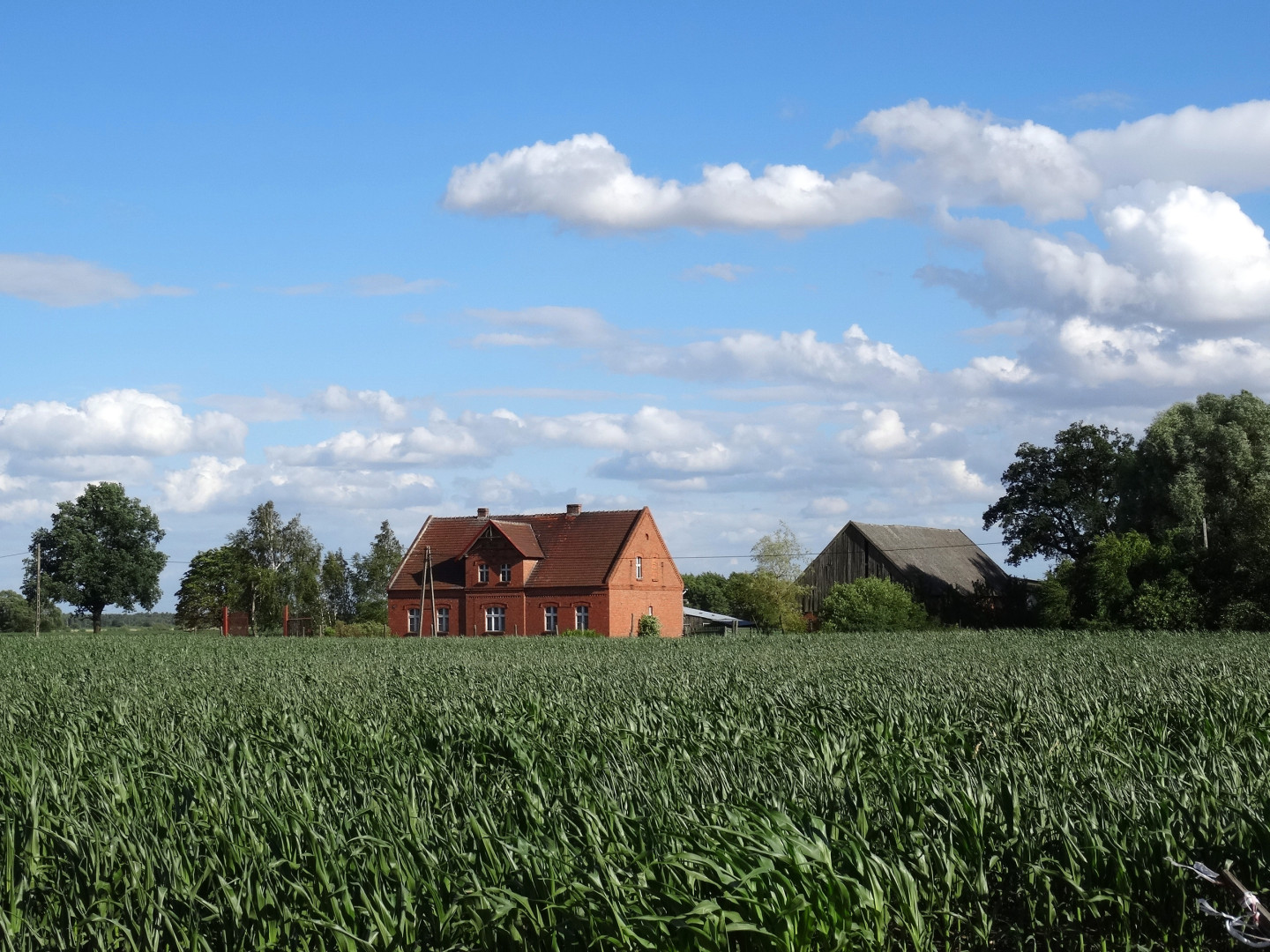 Wieś Dąbrowa Wielka, gmina Nowa Wieś Wielka, powiat bydgoski